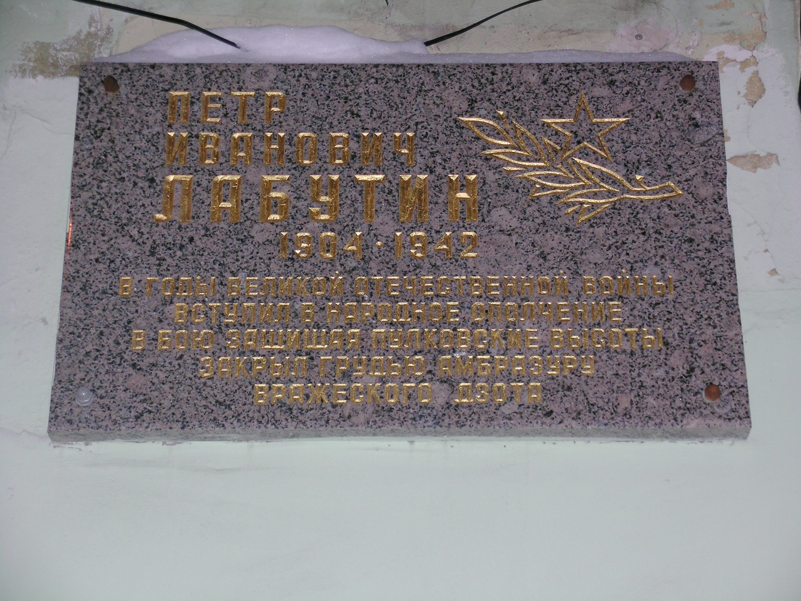 Мемориальная доска. На улице Лабутина угол с Лермонтовским проспектом. Пётр Иванович Лабутин 1904—1942 В годы Великой Отечественной войны вступил в народное ополчение, в бою защищая Пулковские высоты закрыл грудью амбразуру вражеского ДЗОТа